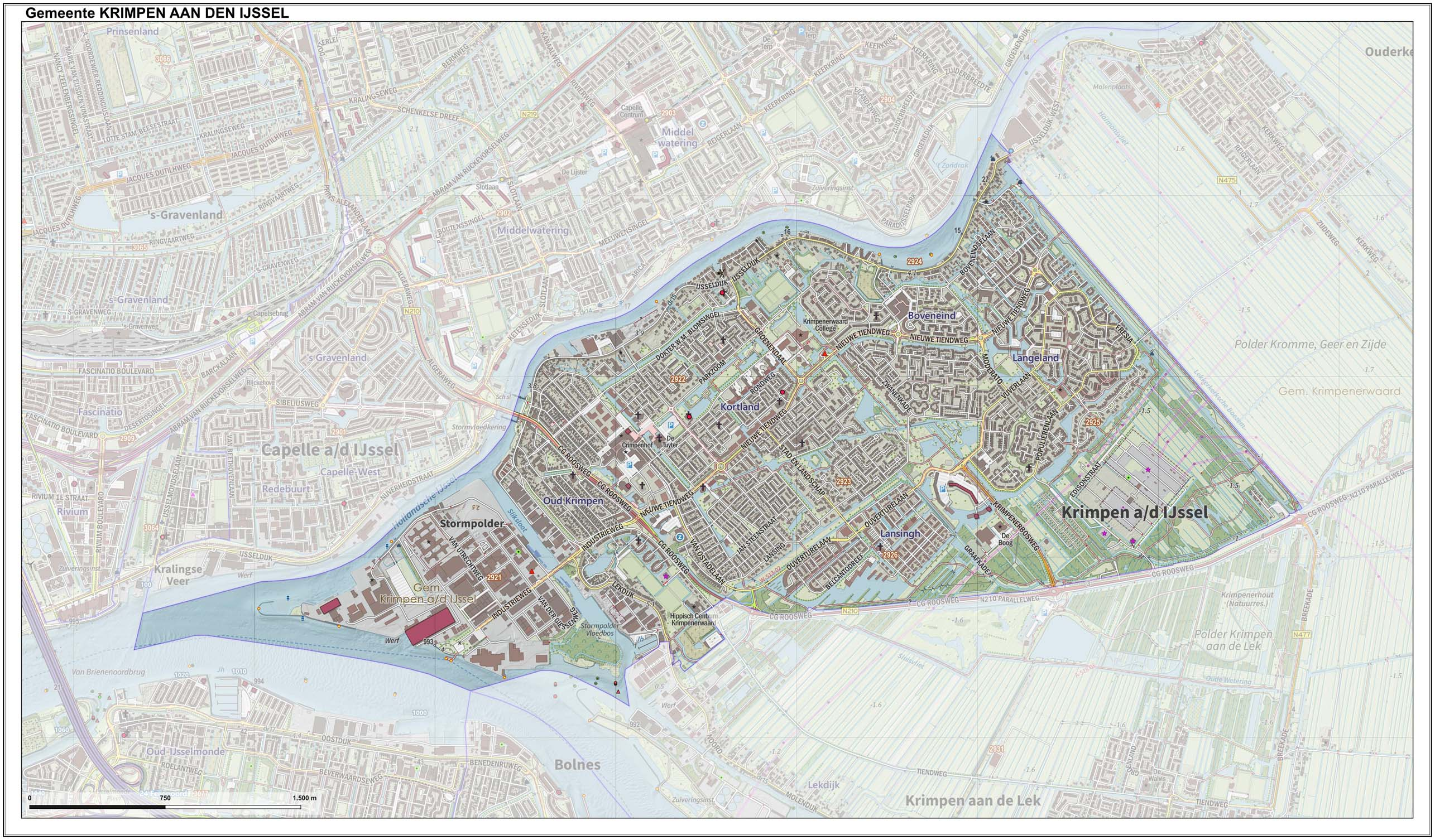 Topografische gemeentekaart. Resolutie: 400 pixels/km. Kaartbeeld samengesteld uit de open geodata van de Top10NL en Top25namen (Kadaster), Creative Commons-BY licentie. Gebouwvlakken uit open geodata BAG extract. Wegen uit de OpenStreetMap, OpenStreetMap community. Reliëfschaduw uit de Actuele Hoogtekaart AHN2. Samenstelling en kleurenschema: Jan-Willem van Aalst, met QGIS. Zie ook de Legenda.